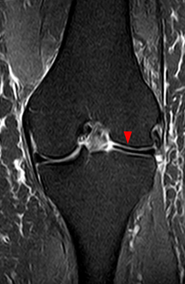 Scheibenmeniskus in der MRT. PDW coronar.